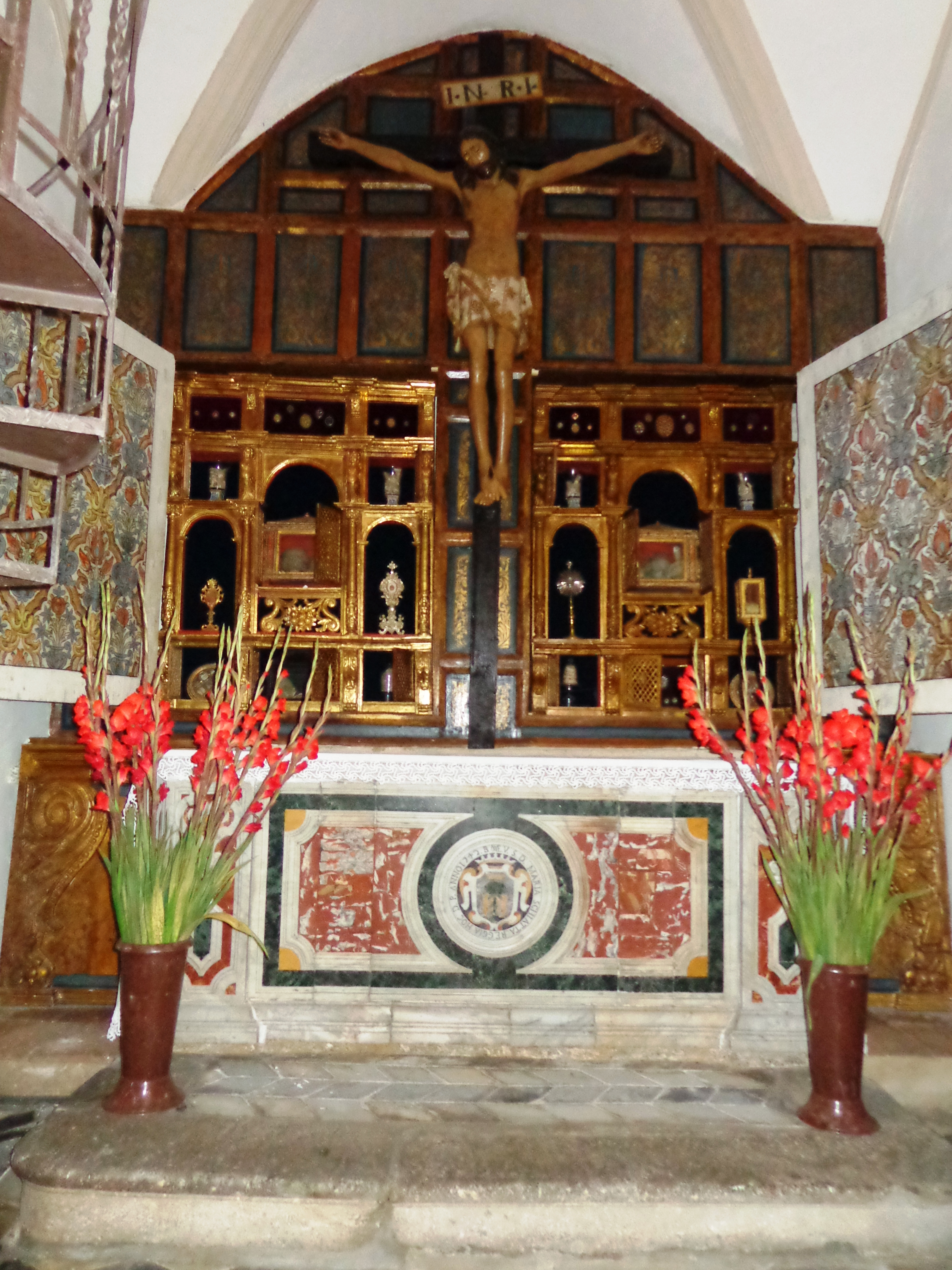 Castroreale_04_2014_14